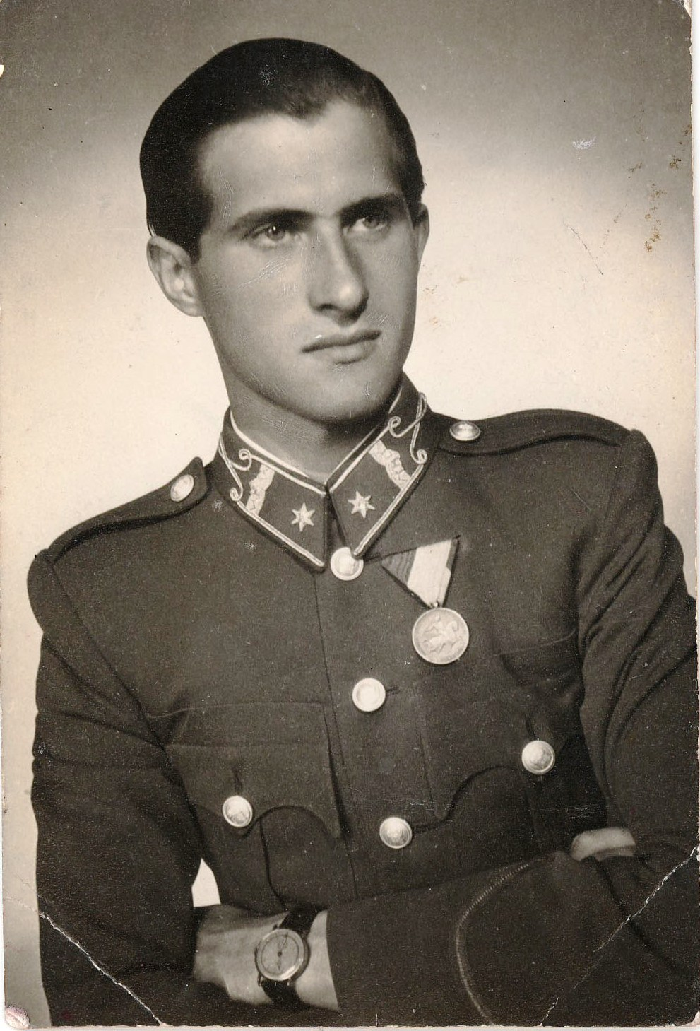 Vitéz Lenz József magyar katonatiszt a II. világháborúból.